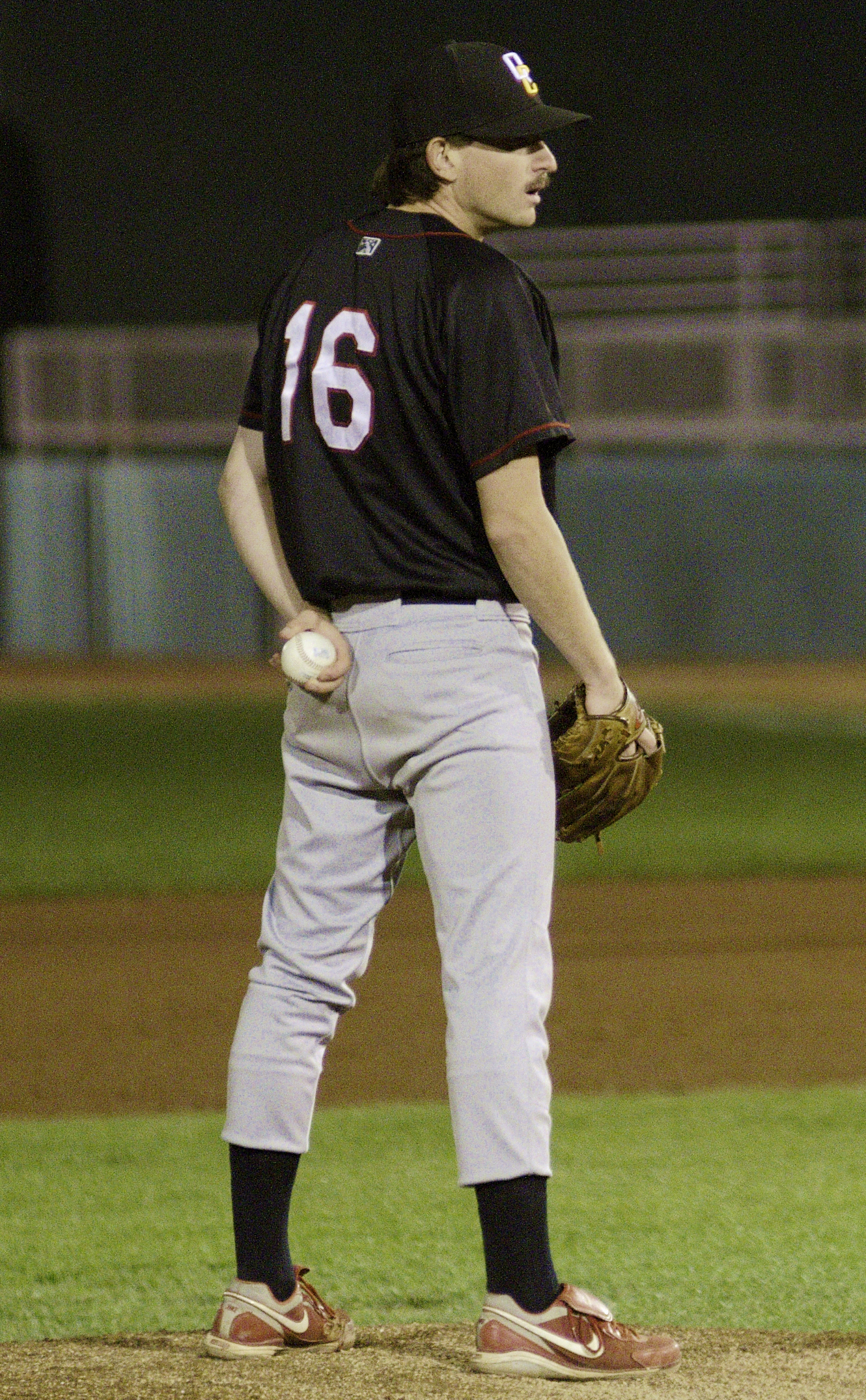 Dean Kiekhefer